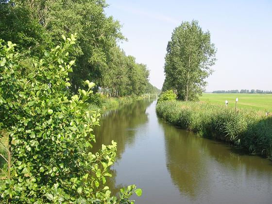 Nuthe bei Gröben, Brandenburg